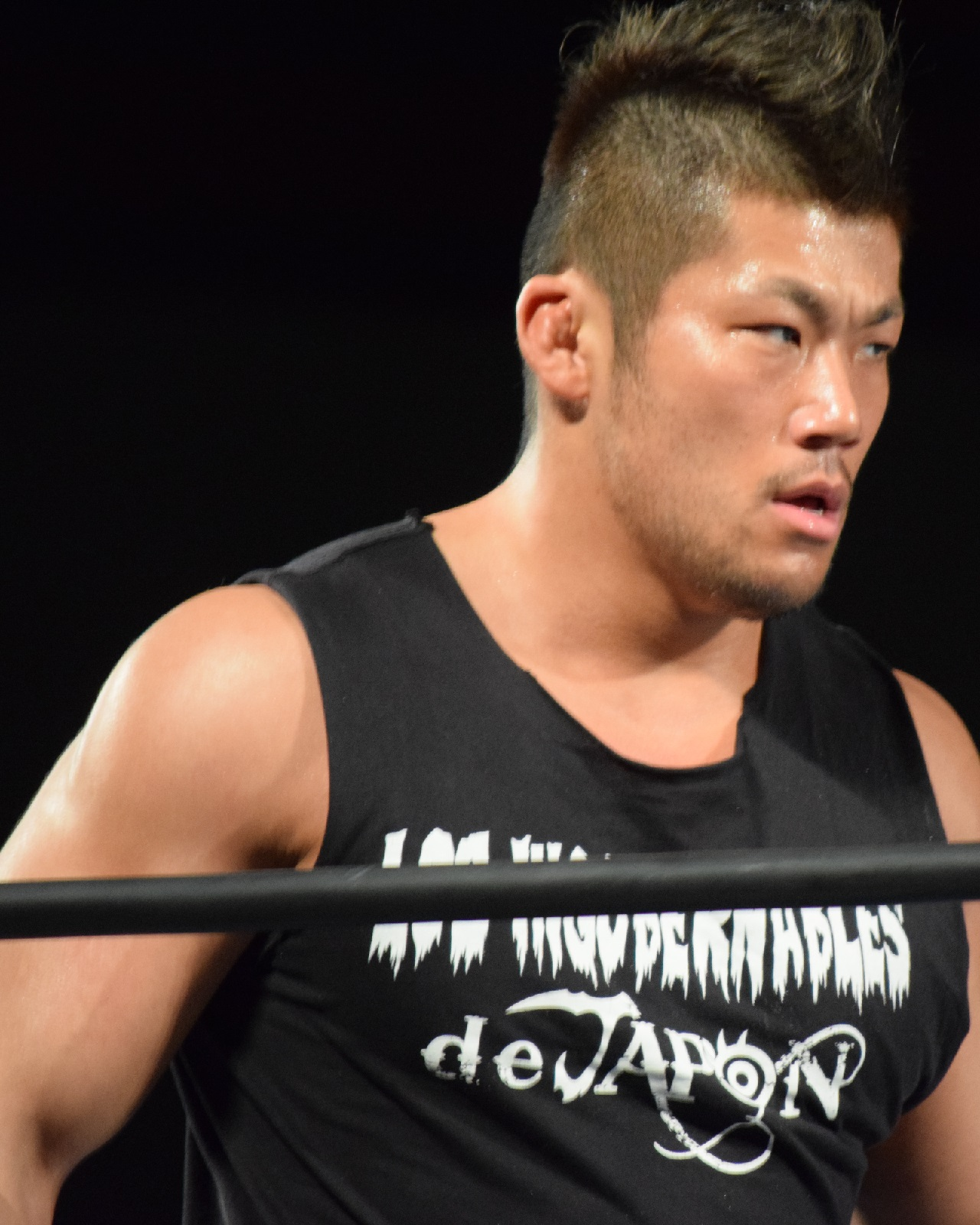 2016年5月29日 大阪市中央体育館・サブアリーナ 「BEST OF THE SUPER Jr.XXIII」 SANADA